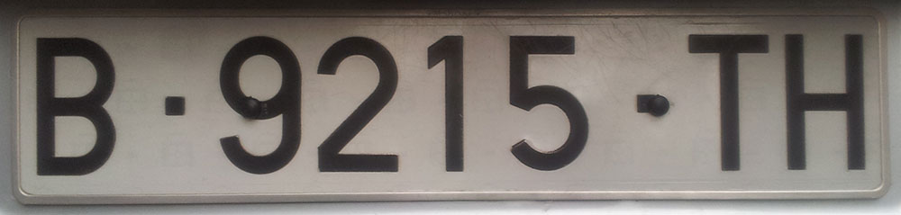 Matrícula sistema post 1971